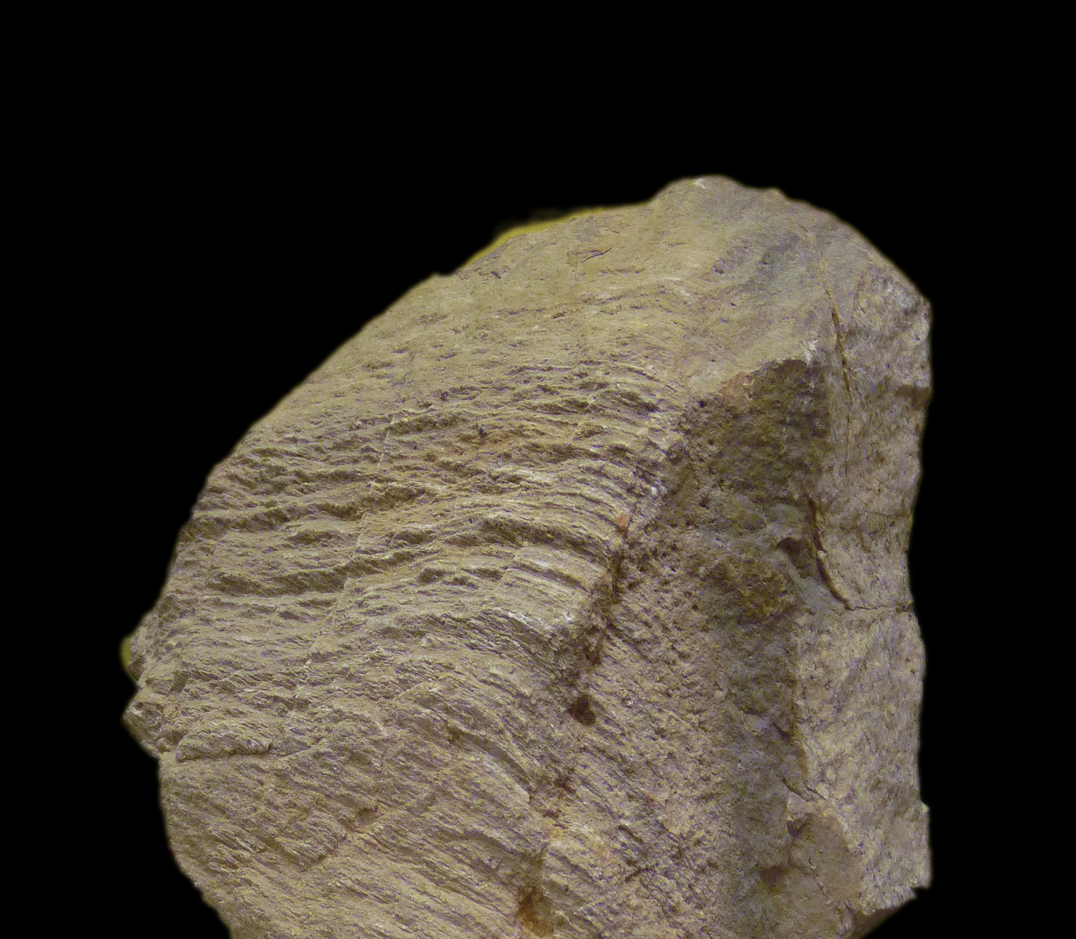 Leptynite à grenats (col des Bagenelles). Musée d'histoire naturelle et d'ethnographie de Colmar